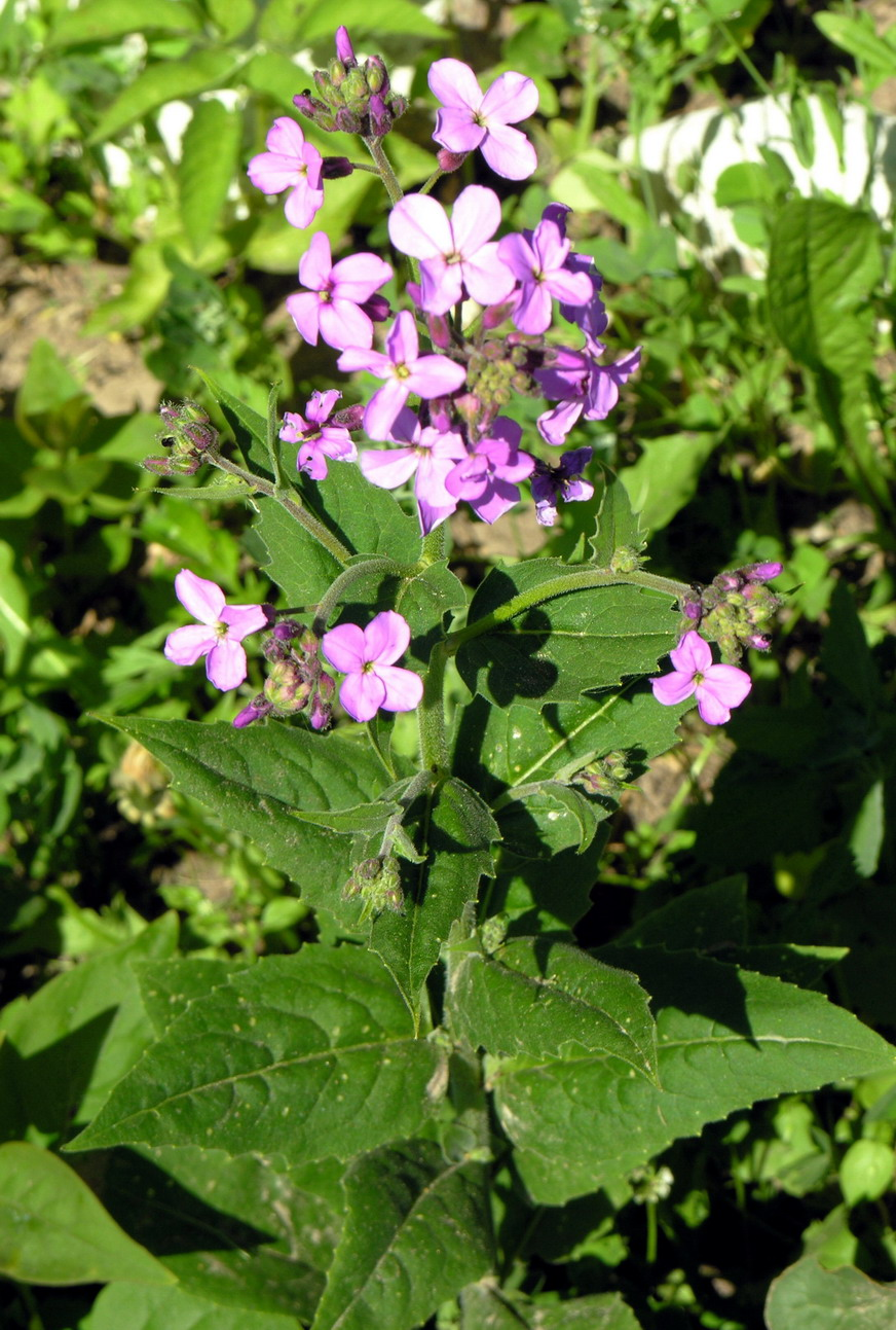 Kvapioji vakarutė (Hesperis matronalis) Šeima. Bastutiniai (Brassicaceae) Foto: Algirdas, 2006 m. birželio 16 d.